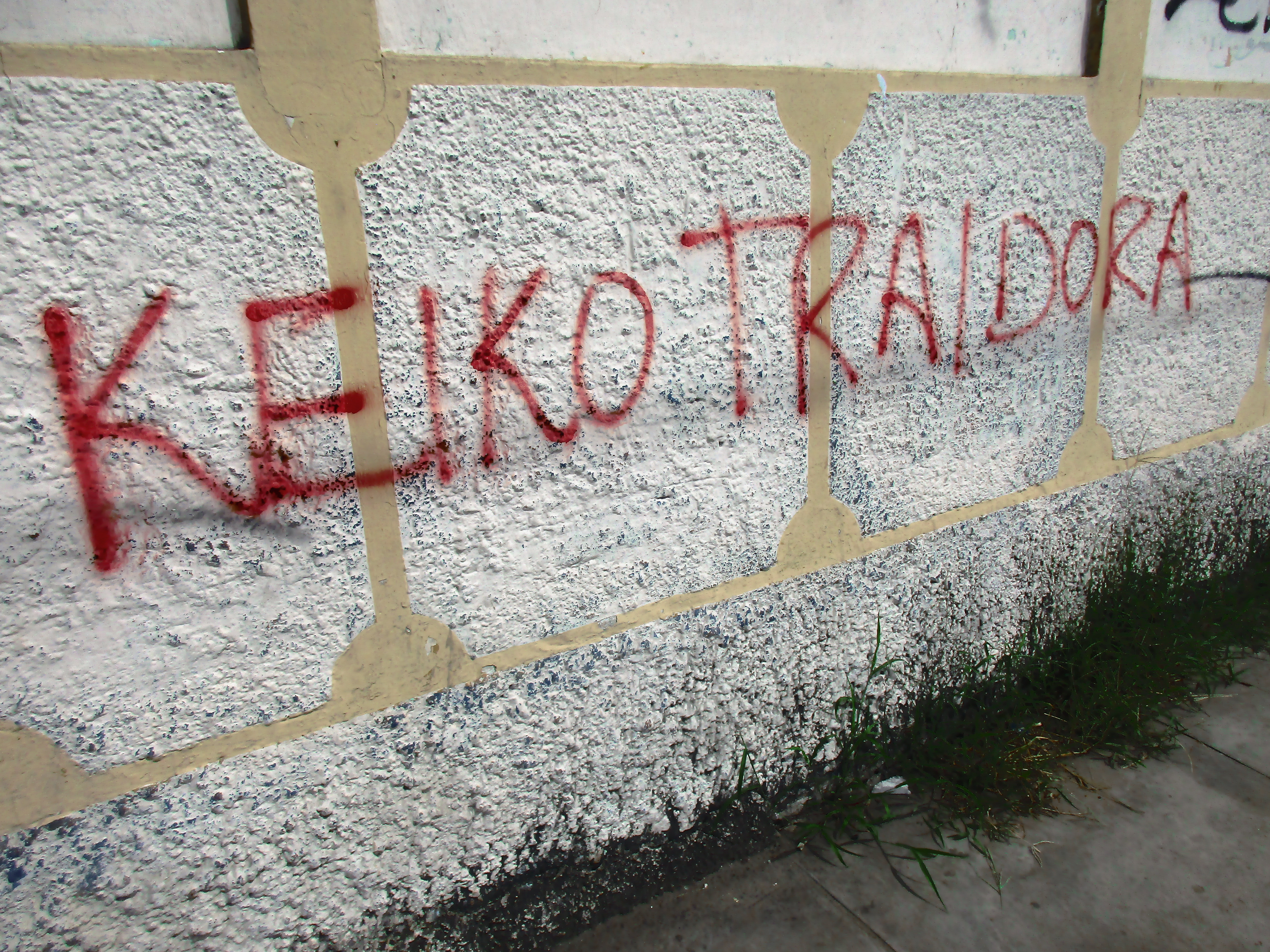 Keiko Traidora-Antifujimorismo en Iquitos